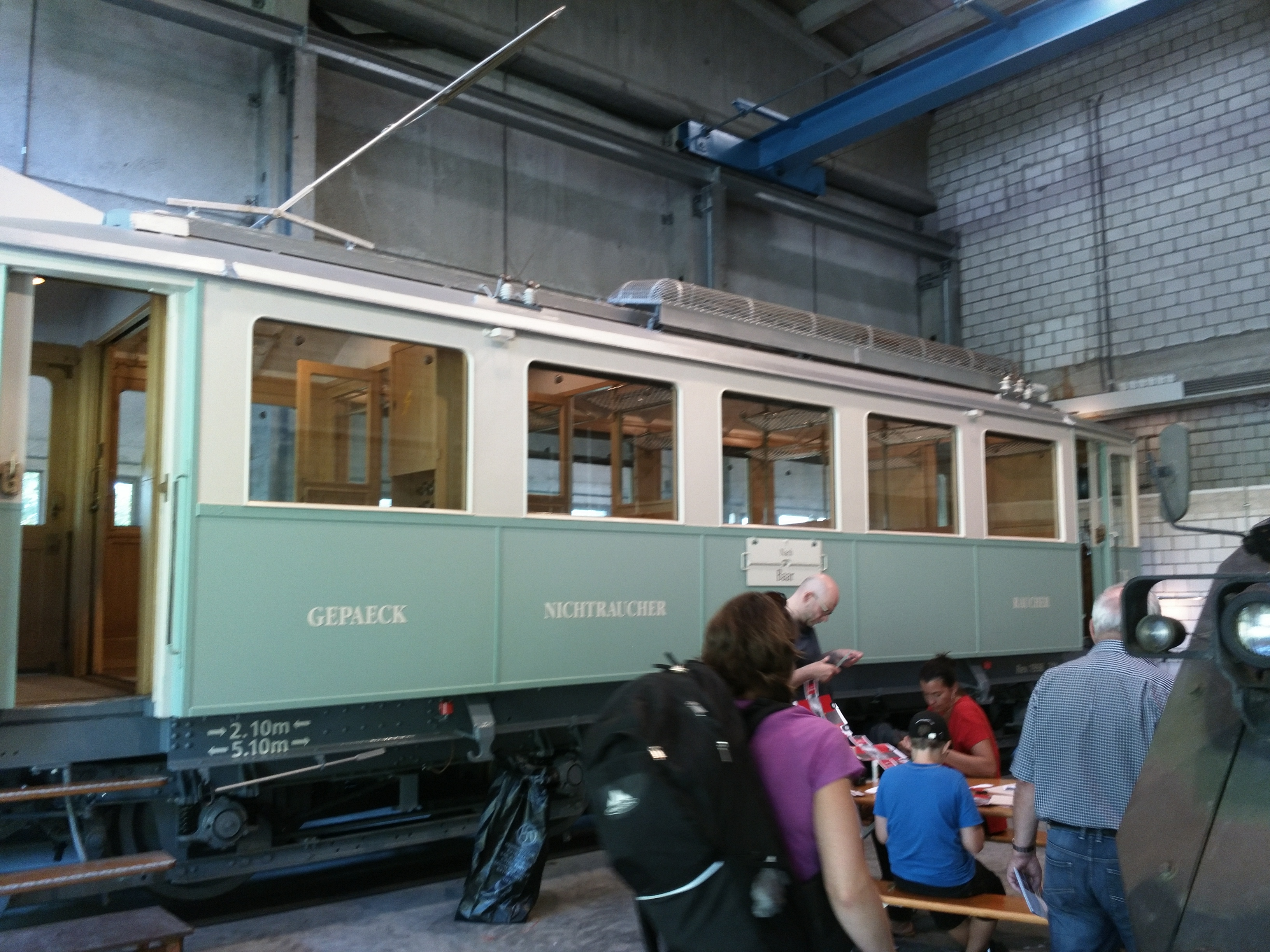 CFe 4 4 Seitenansicht